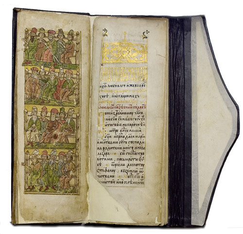 Закон о рудницима деспота Стефана Лазаревића, око 1580, Минијатура. (лист 2в), Београд, Архив САНУ, бр.465 (Поклон Францијета Хачарева и супруге)